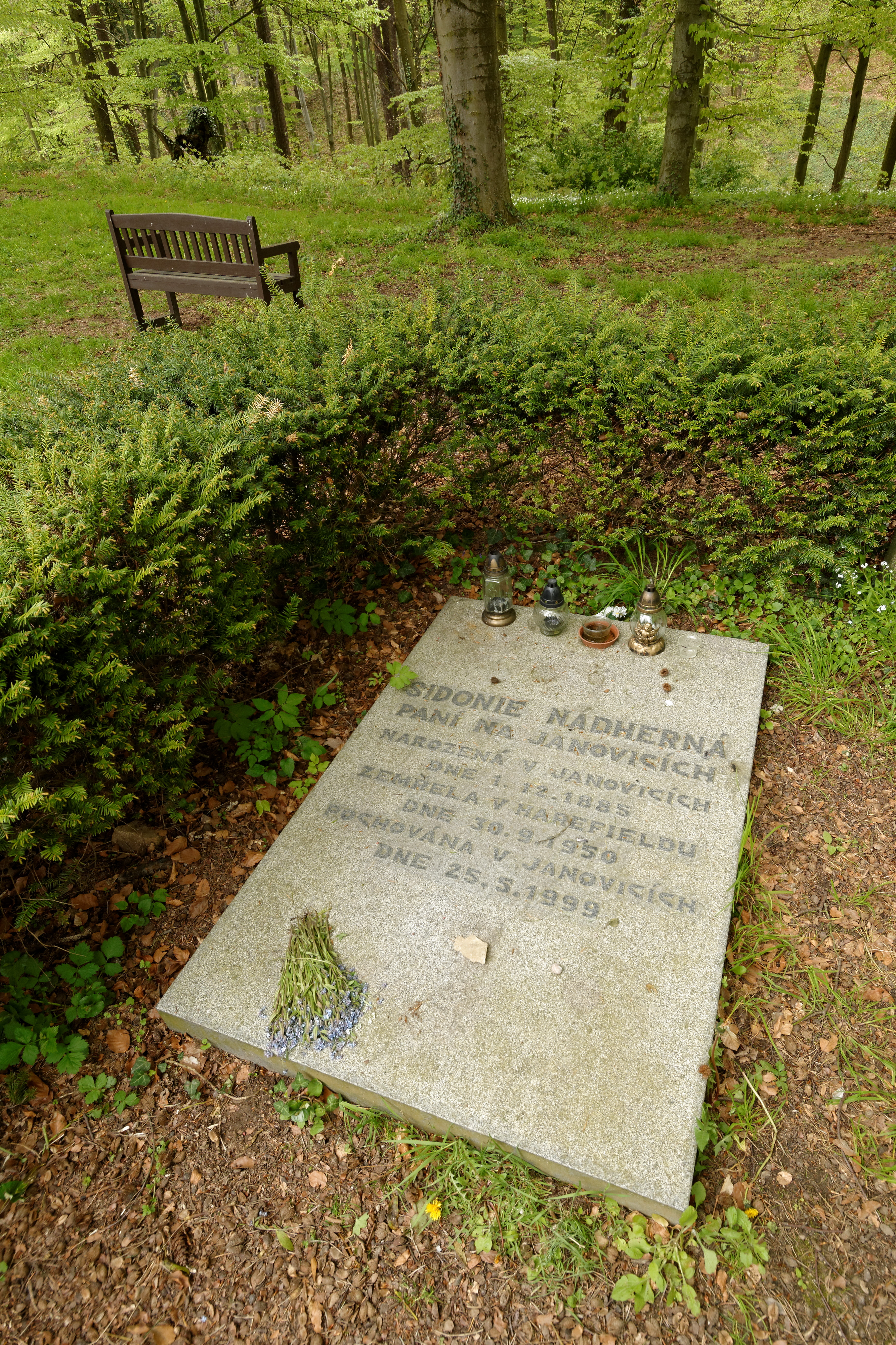 Vrchotovy Janovice, zámecký park, hřbitov rodiny Nádherných z Borutína. Hrob Sidonie Nádherné.